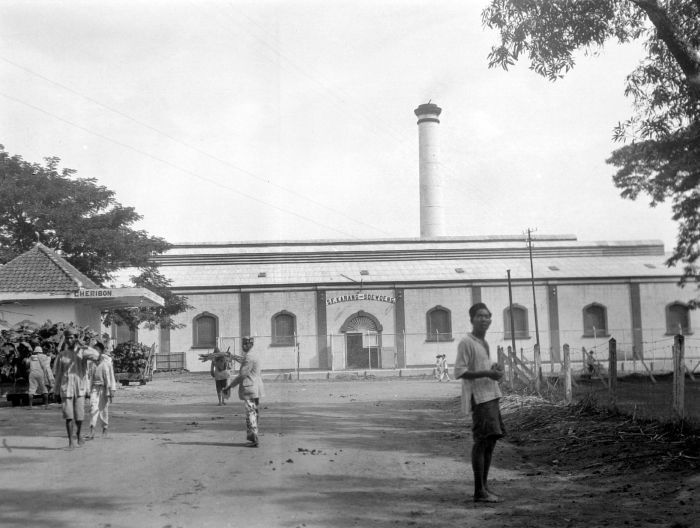 Negatief. Suikerfabriek Karang Soewoeng, Res. Cheribon